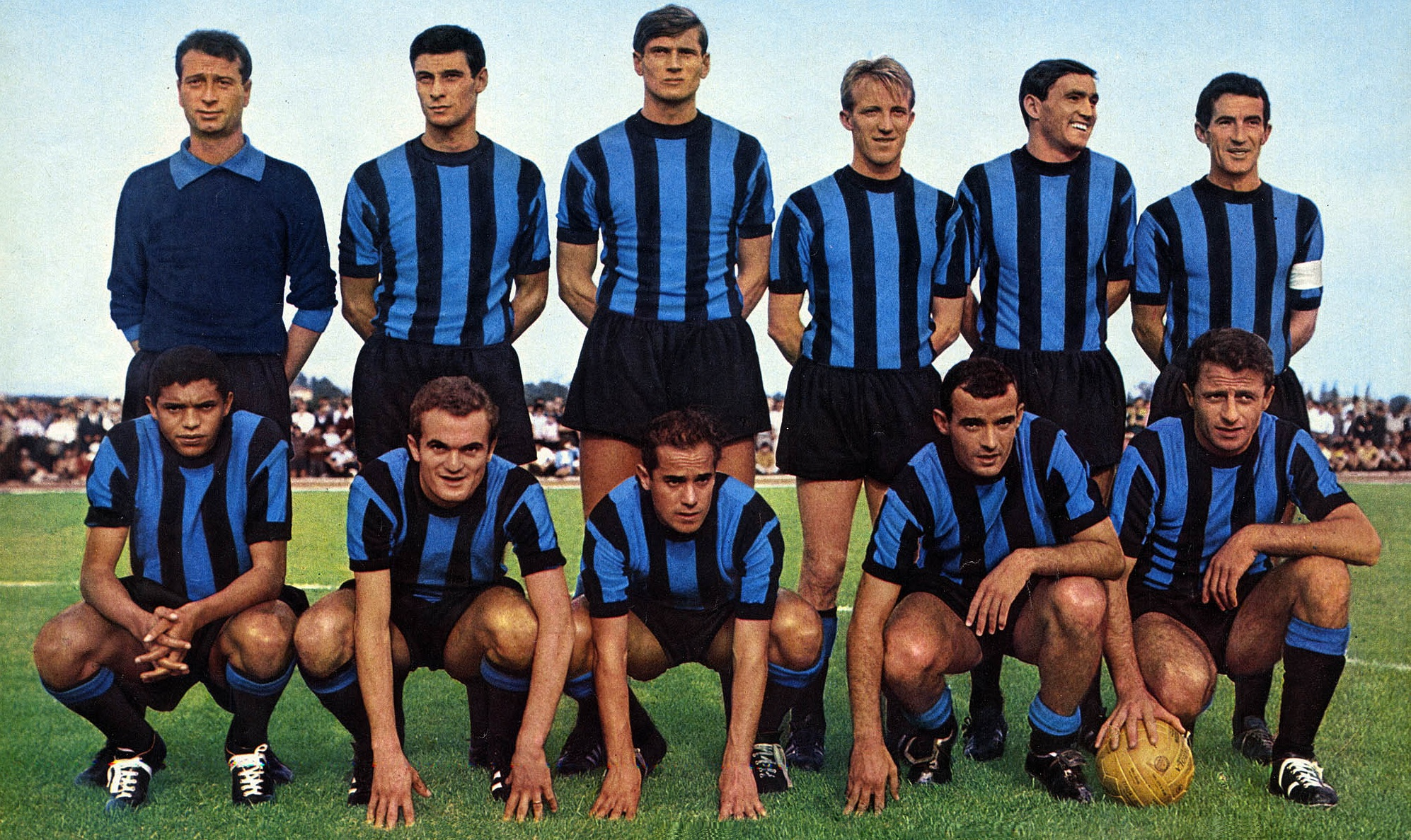 Una formazione dell'Inter 1964-1965. In piedi, da sinistra: Sarti, Guarneri, Facchetti, Tagnin, Burgnich e Picchi. Accasciati, da sinistra: Jair, Mazzola, Suarez, Corso e Milani.